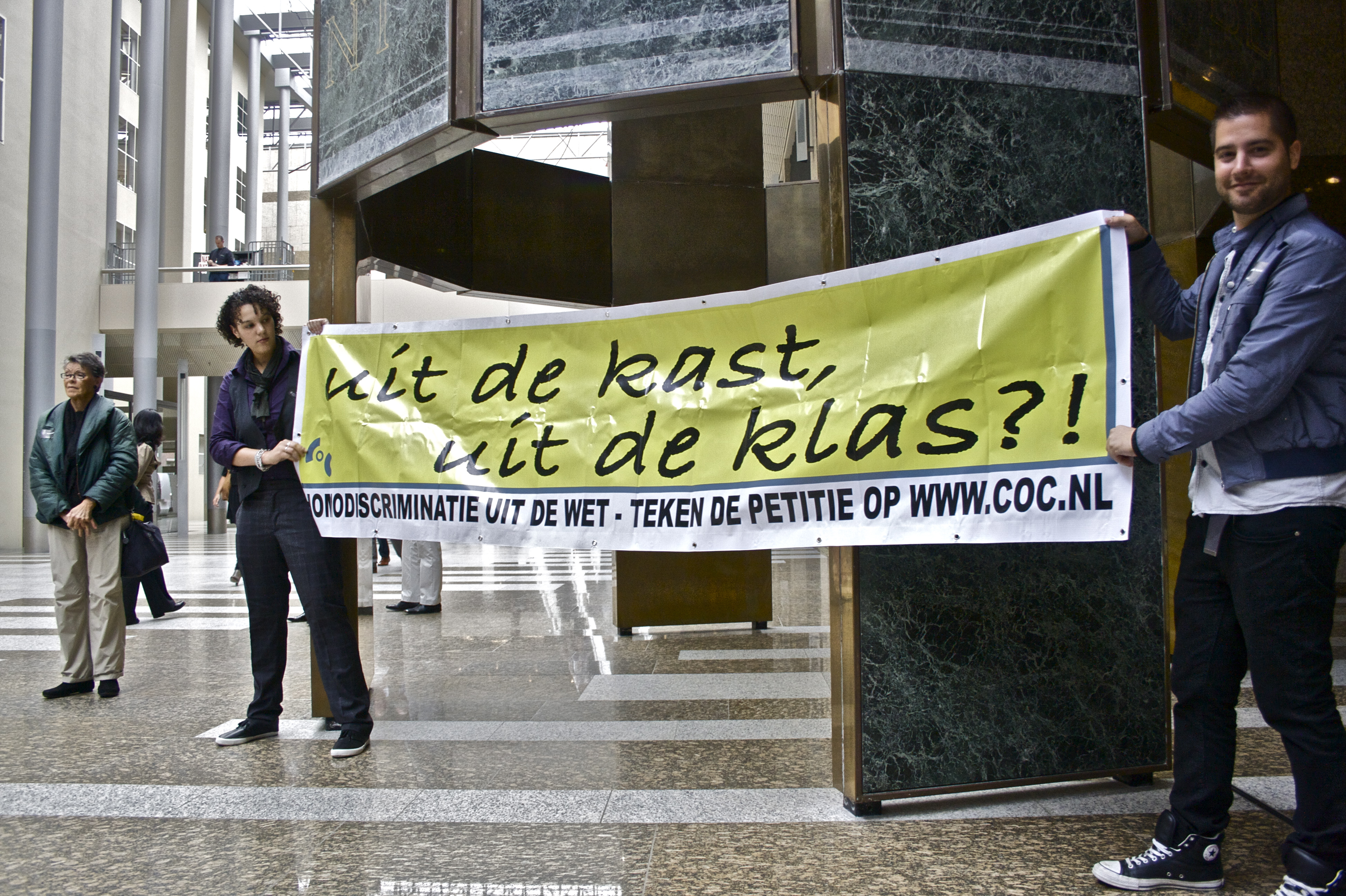 Statenpassage, Aanbieding "Uit de kast, Uit de klas"